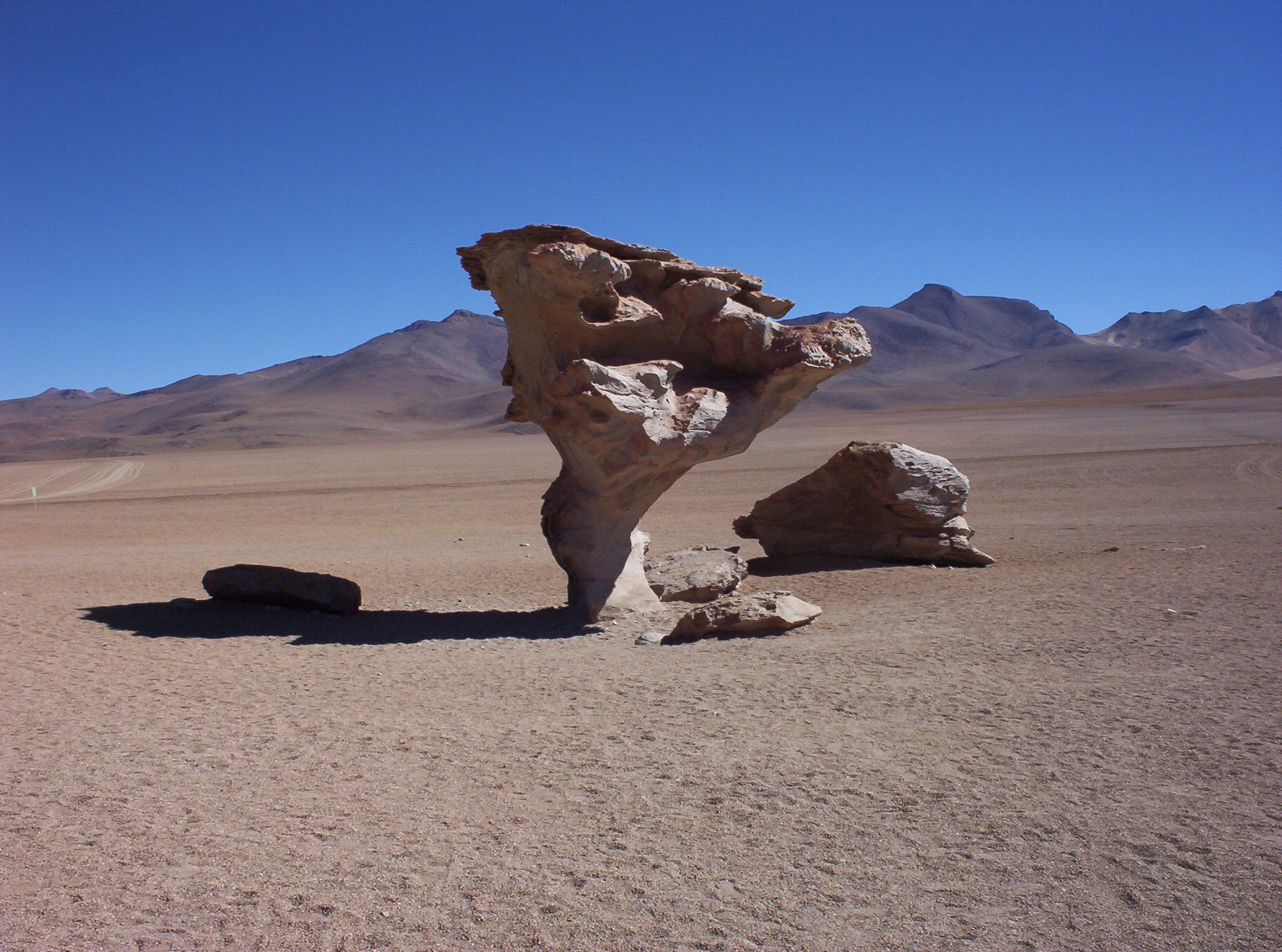 Bizarre Felsgebilde (Pilzfelsen; Árbol de Piedra – Baum aus Stein) in der Siloli-Wüste südwestlich von Uyuni nahe der Laguna Colorada, Bolivien. Der Fels befindet sich nicht im Salar de Uyuni. Česky: Árbol de Piedra (Kamenný strom), skalní útvar nacházející se v poušti Siloli na bolivijském Altiplanu